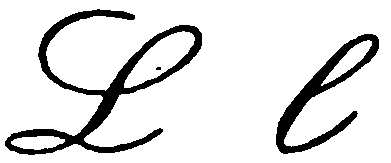 Caractère latin d'écriture, L l